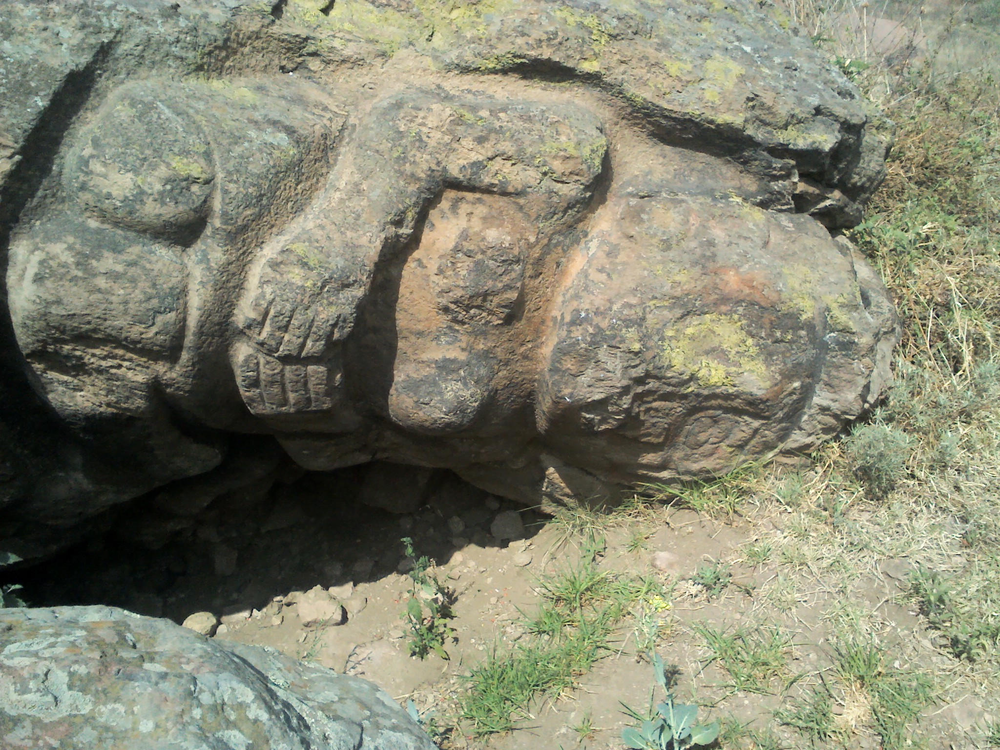 Posible representación de una diosa asociada a la fertilidad como son: Cihuacóatl (náhuatl: cihuacoatl, ‘mujer serpiente’‘cihuatl, mujer; coatl, serpiente’), Chicomecoatl (náhuatl: chicomecoatl, ‘siete serpiente’‘chicome, siete; coatl serpiente’), ilamantecutli y Cihuateteo (náhuatl: cihuateteo, ‘mujeres diosas’‘cihuatl, mujer; teteo, dioses’)